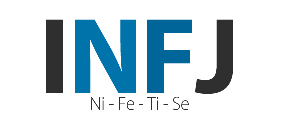 Logo INFJ MBTI.